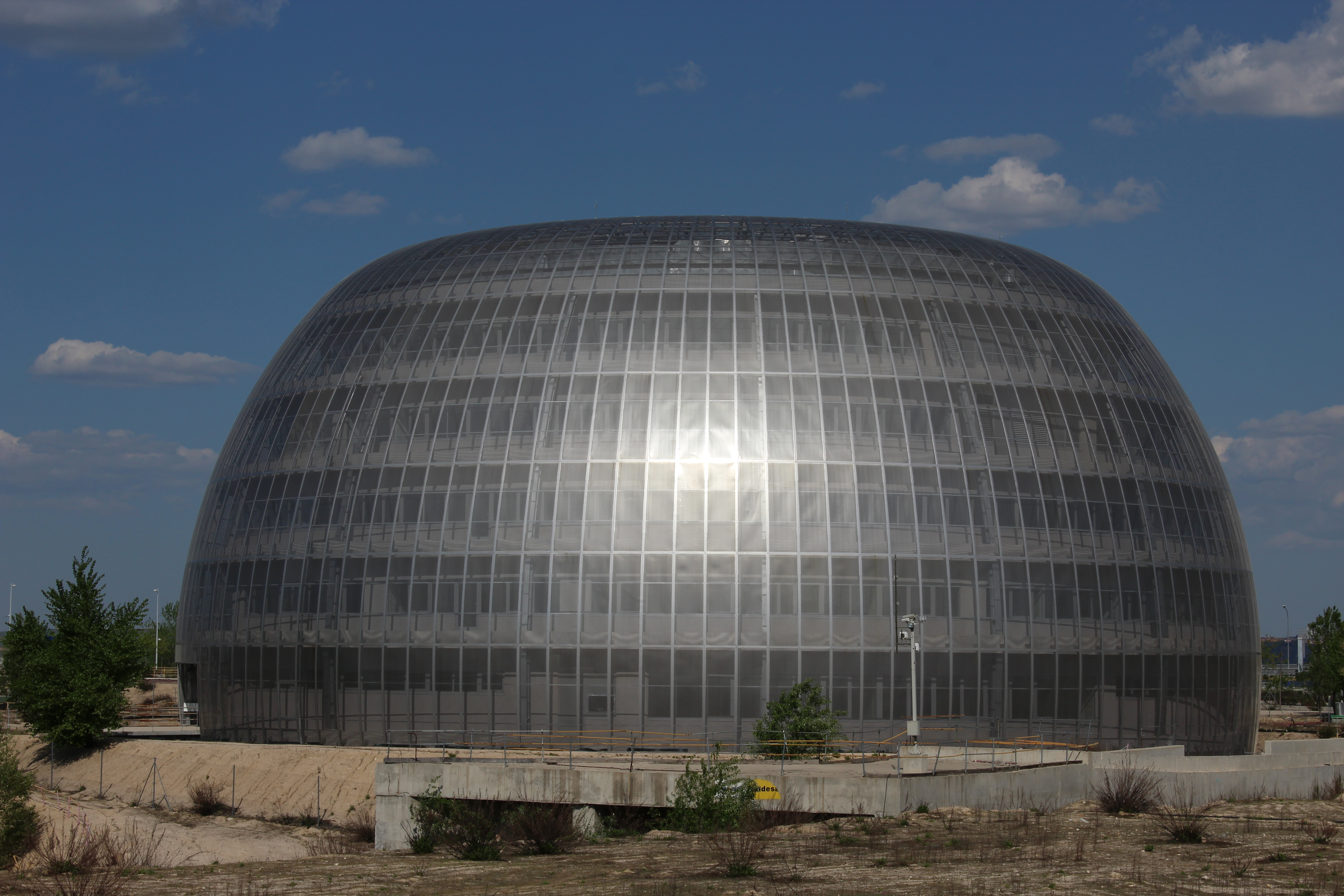 Donut de Valdebebas, Madrid.